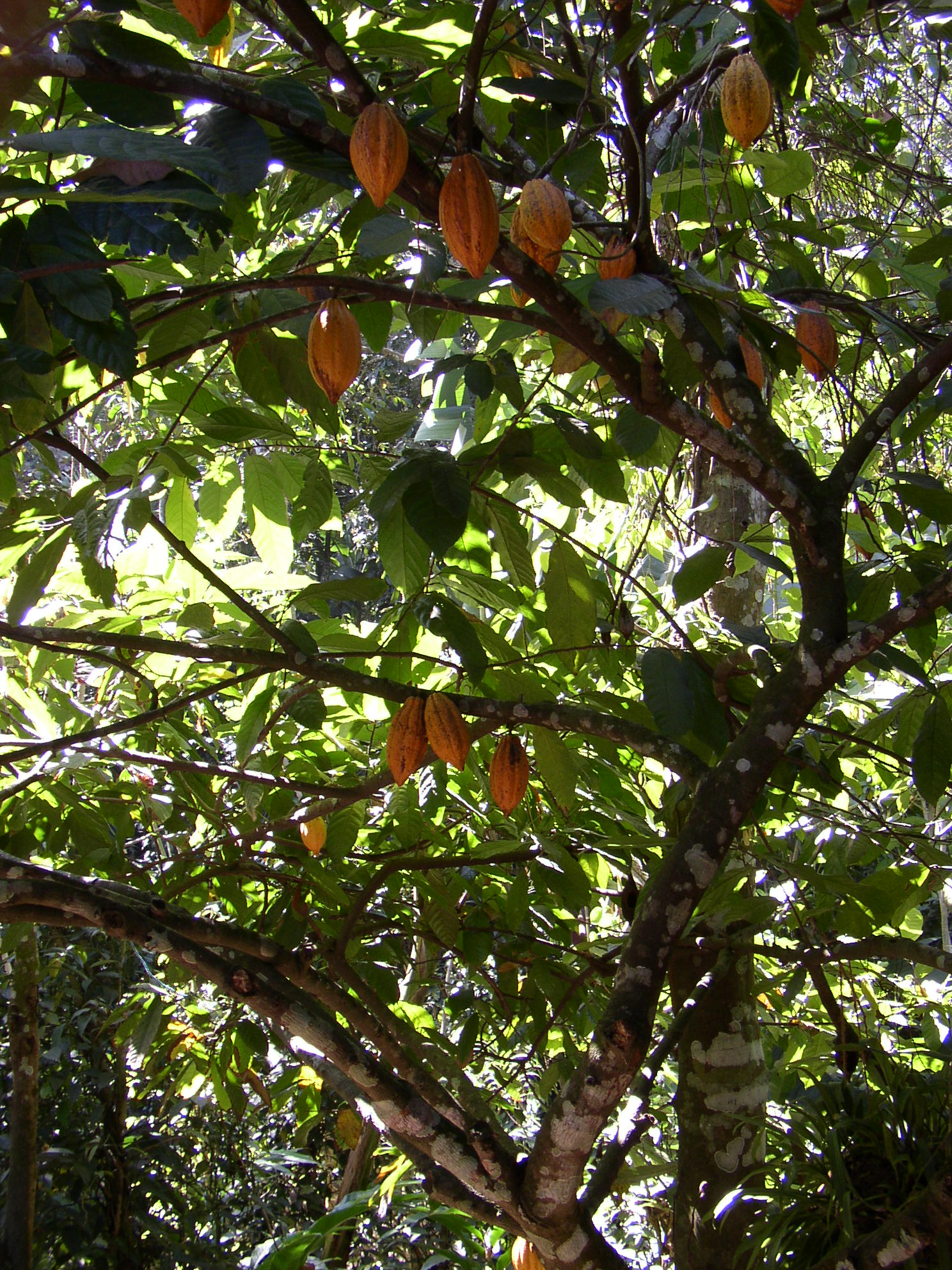 Kakaofrüchte; Kerala (Indien); selbst fotografiert; Februar 2003; GNU-FDL